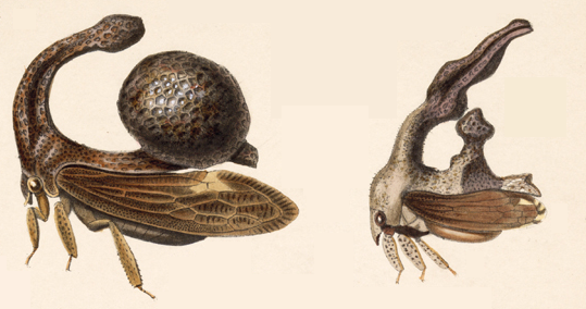 Membracidae Plate